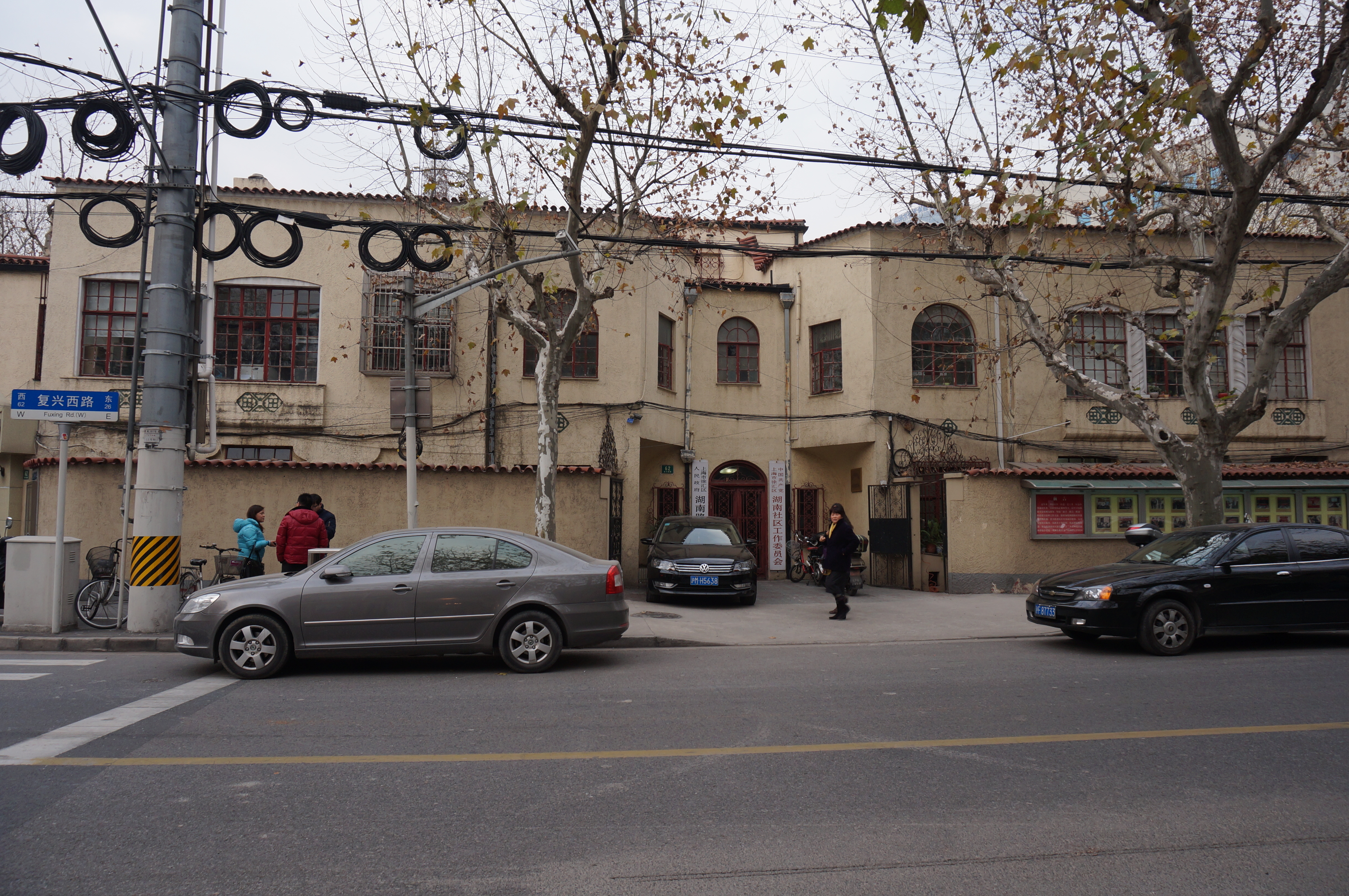 修道院公寓（今湖南路街道办事处）